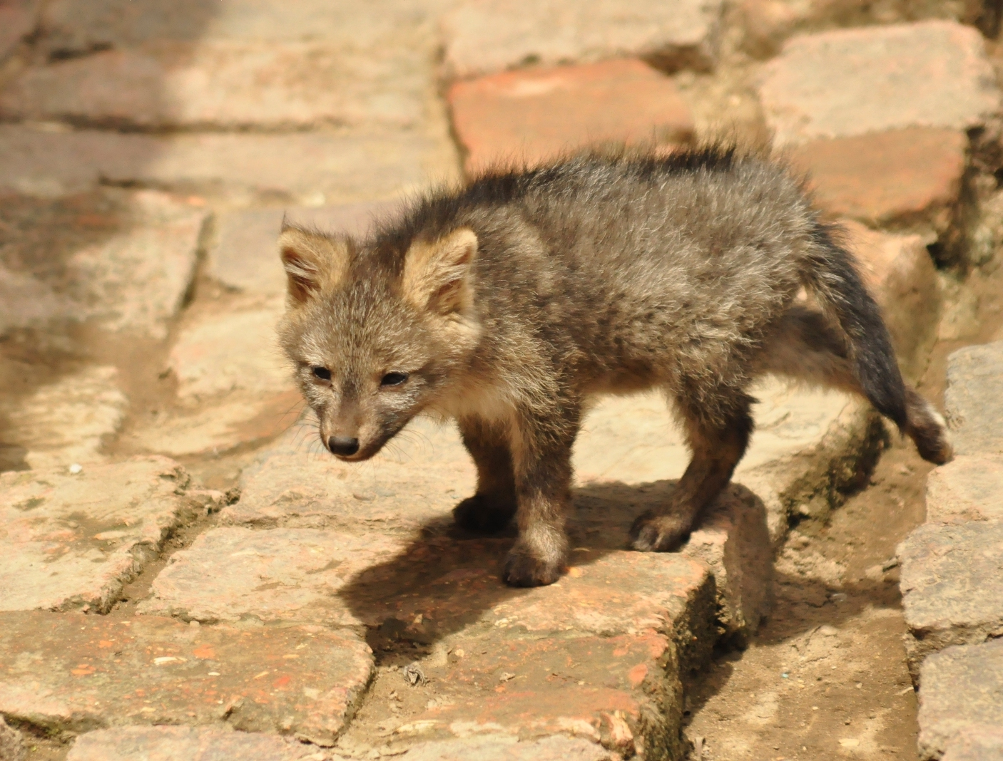 Ejemplar joven de Cerdocyon thous en cautiverio, Sutamarchán, Boyacá, colombia